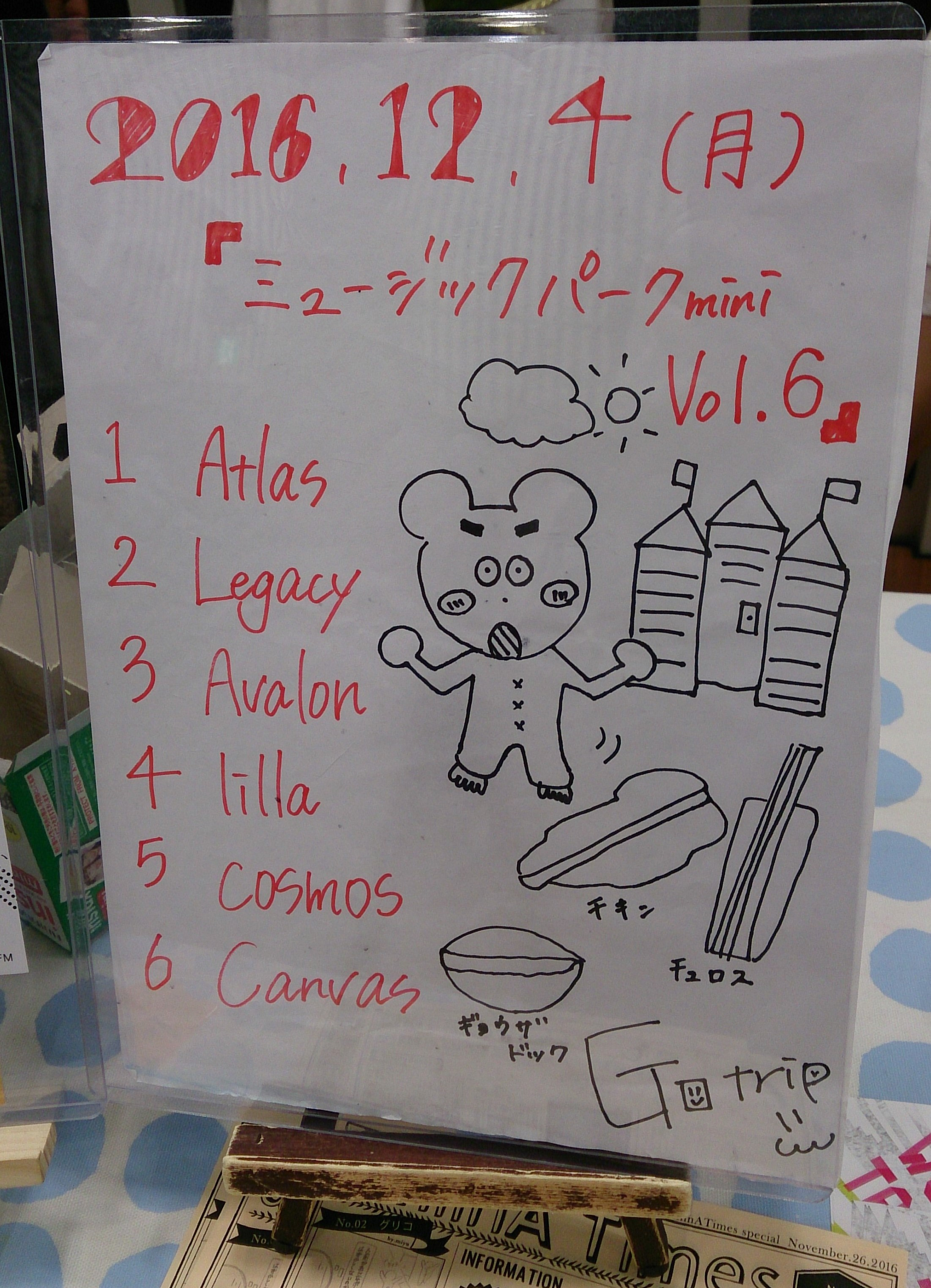 amiinAセトリボード(20161204(1))